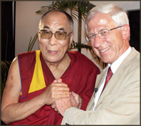 Nach einem Interview für "Report" München - Der Dalai Lama mit Franz Alt 2005. Foto: Bigi Alt